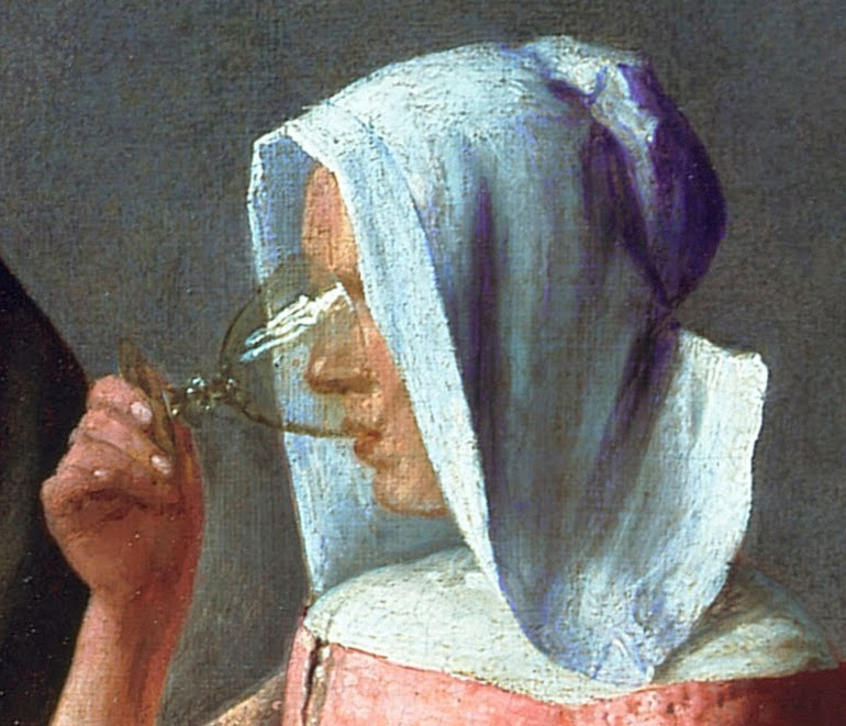 Vermeer Le Verre de vin detail de la femme buvant